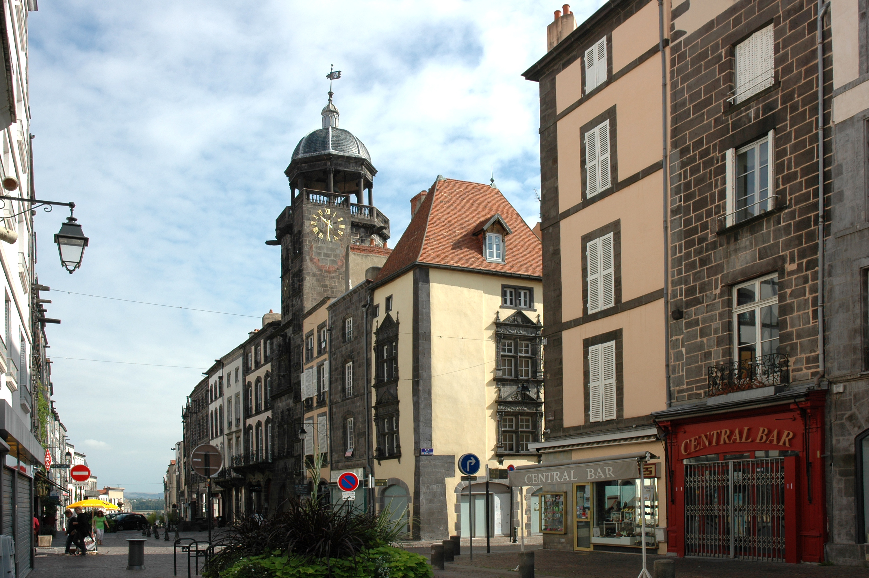 Tour de l'horloge, Riom